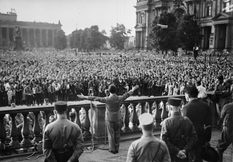 Dr. Goebbels, Rede i. Lustgarten Berlin